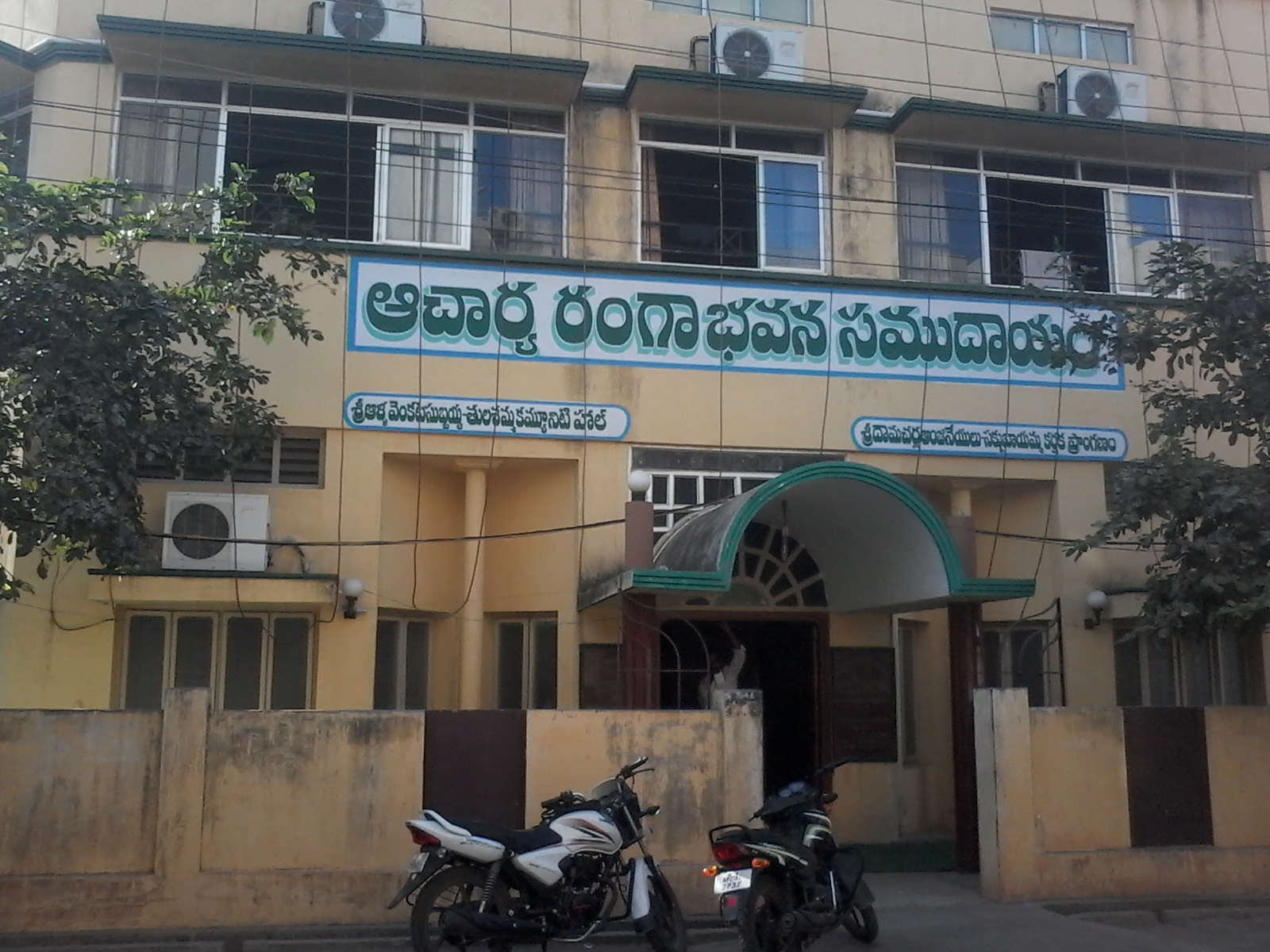 సమావేశ మందిరం, ఒంగోలు